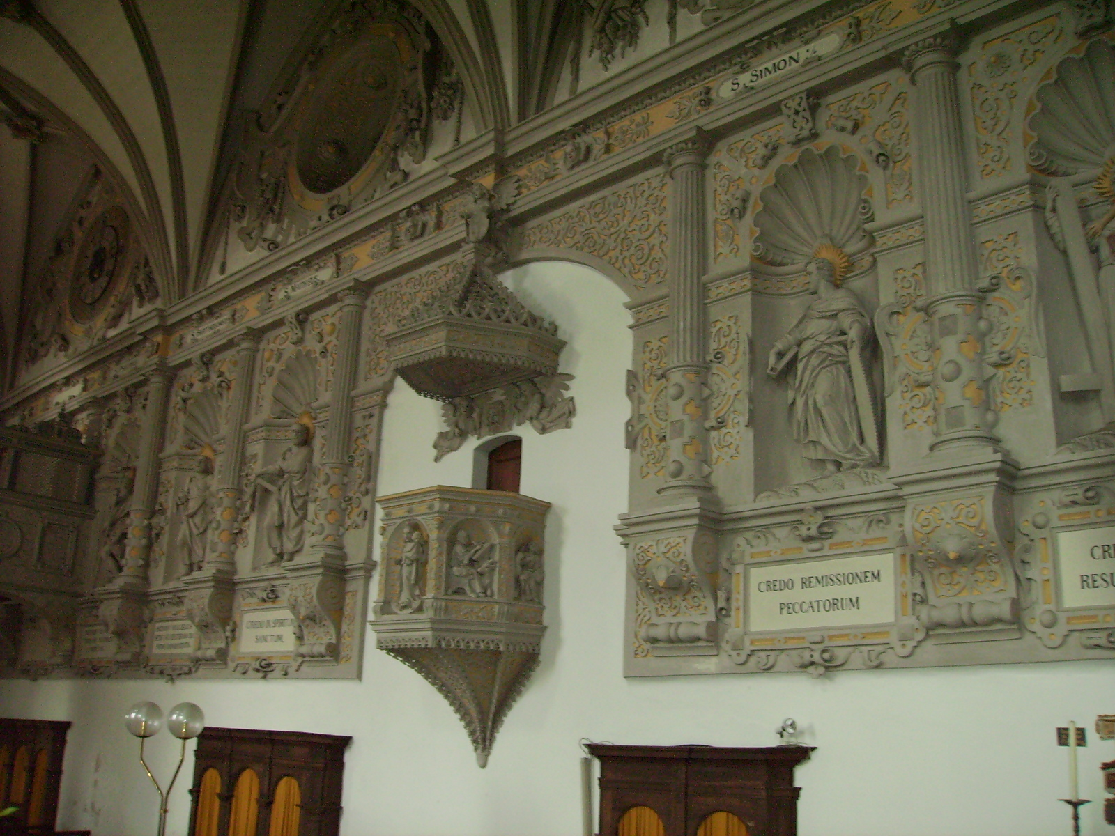 Hechingen